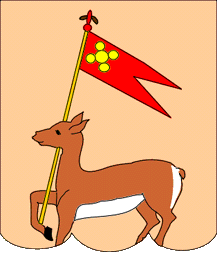 Yaklaşık olarak 500 yıl boyunca kullanılan Ortodoksluk dönemi Shirvan bayrağı